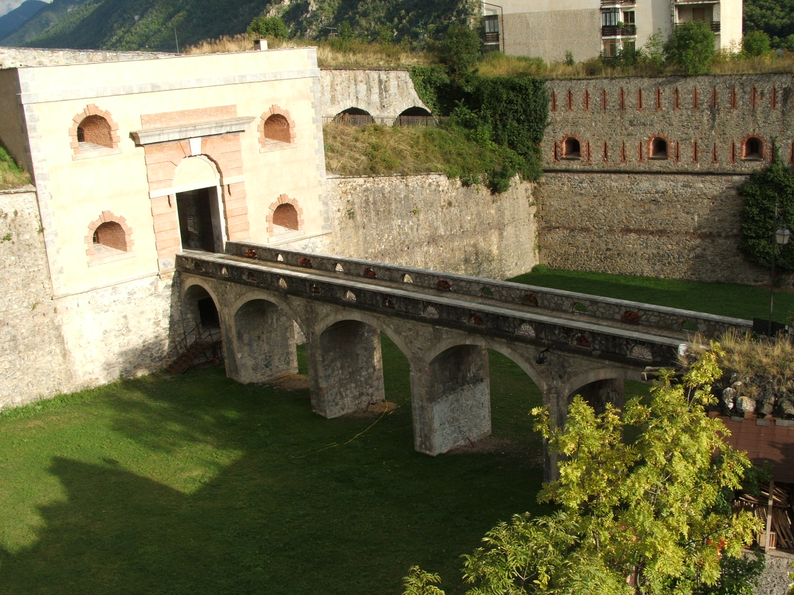 Valle Stura di Demonte - Immagine da Vinadio